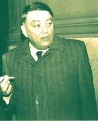 Riccardo Malpica